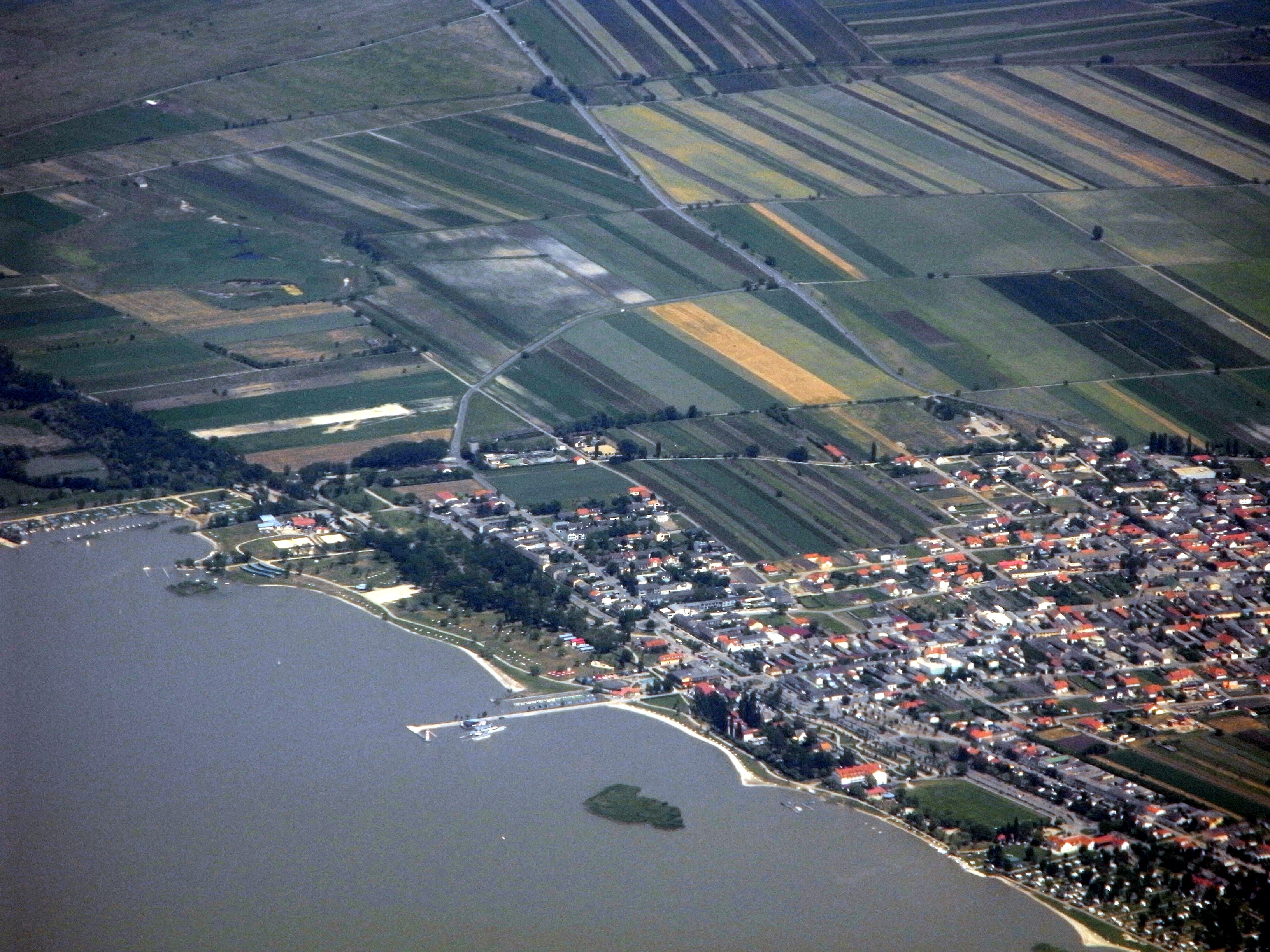 Podersdorf, von über dem Neusiedler See aus gesehen.